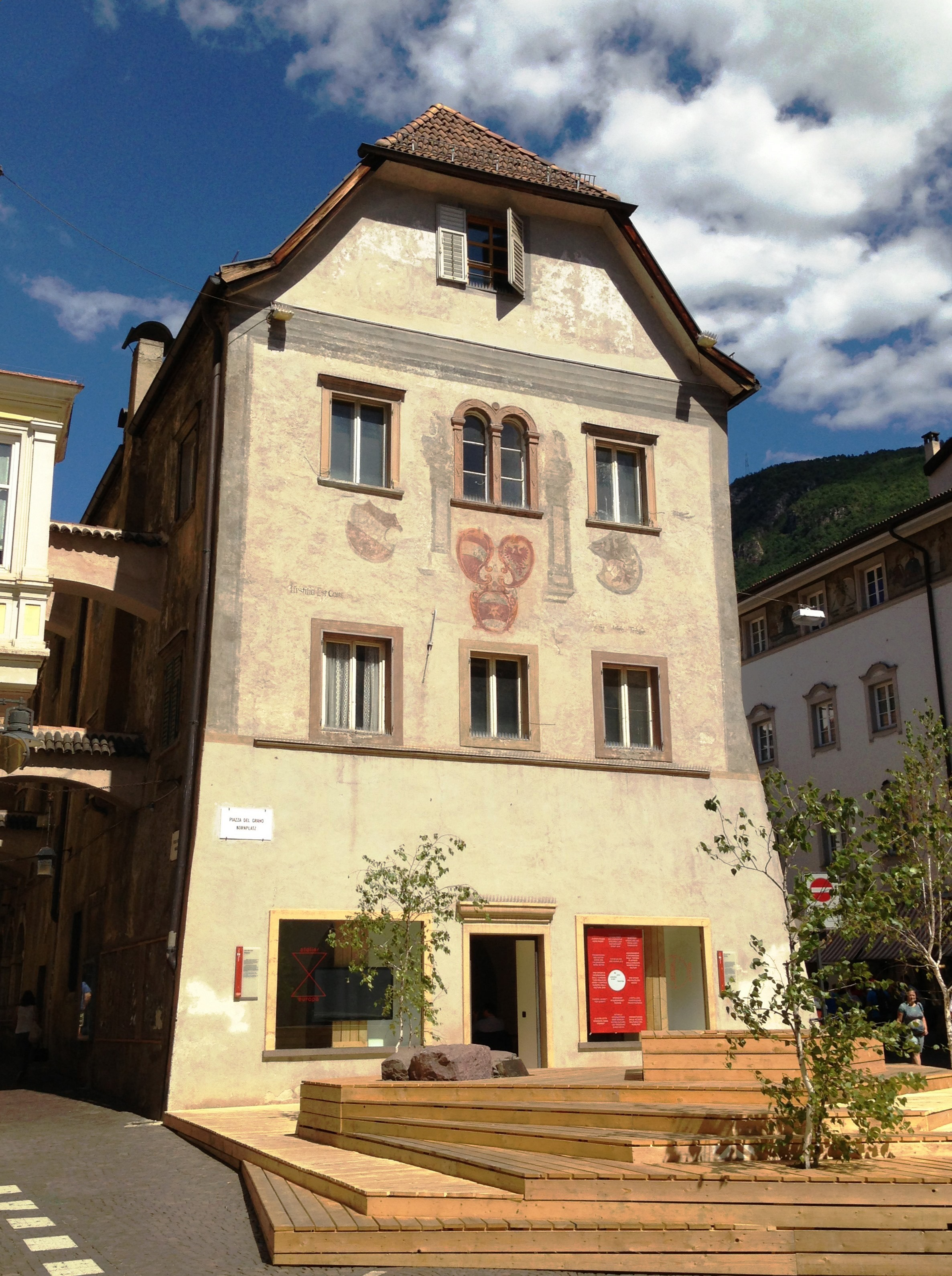 Das Waaghaus in Bozen (Südtirol)